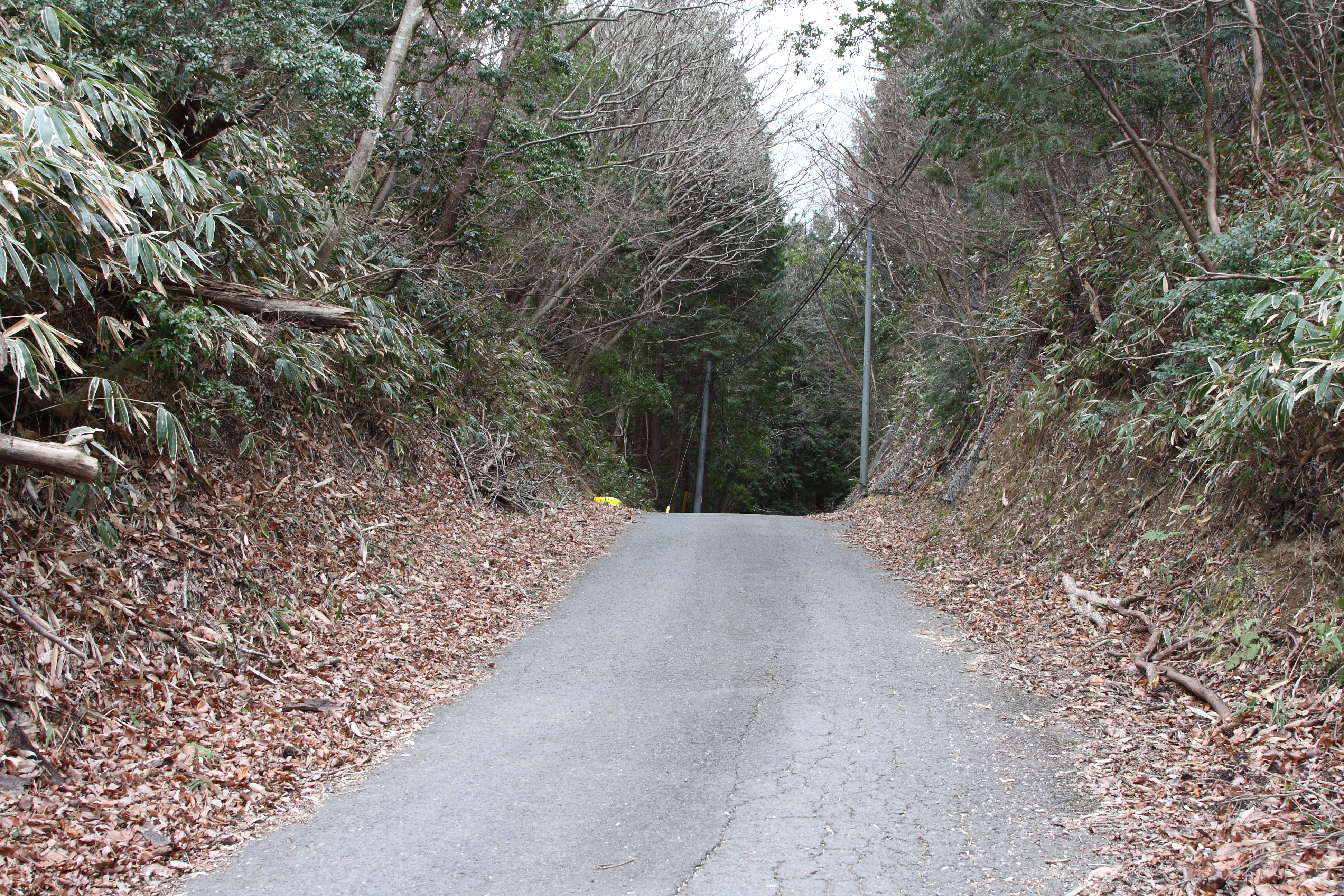 一台峠 奈良県奈良市南田原町側 奈良県道・京都府道47号天理加茂木津線